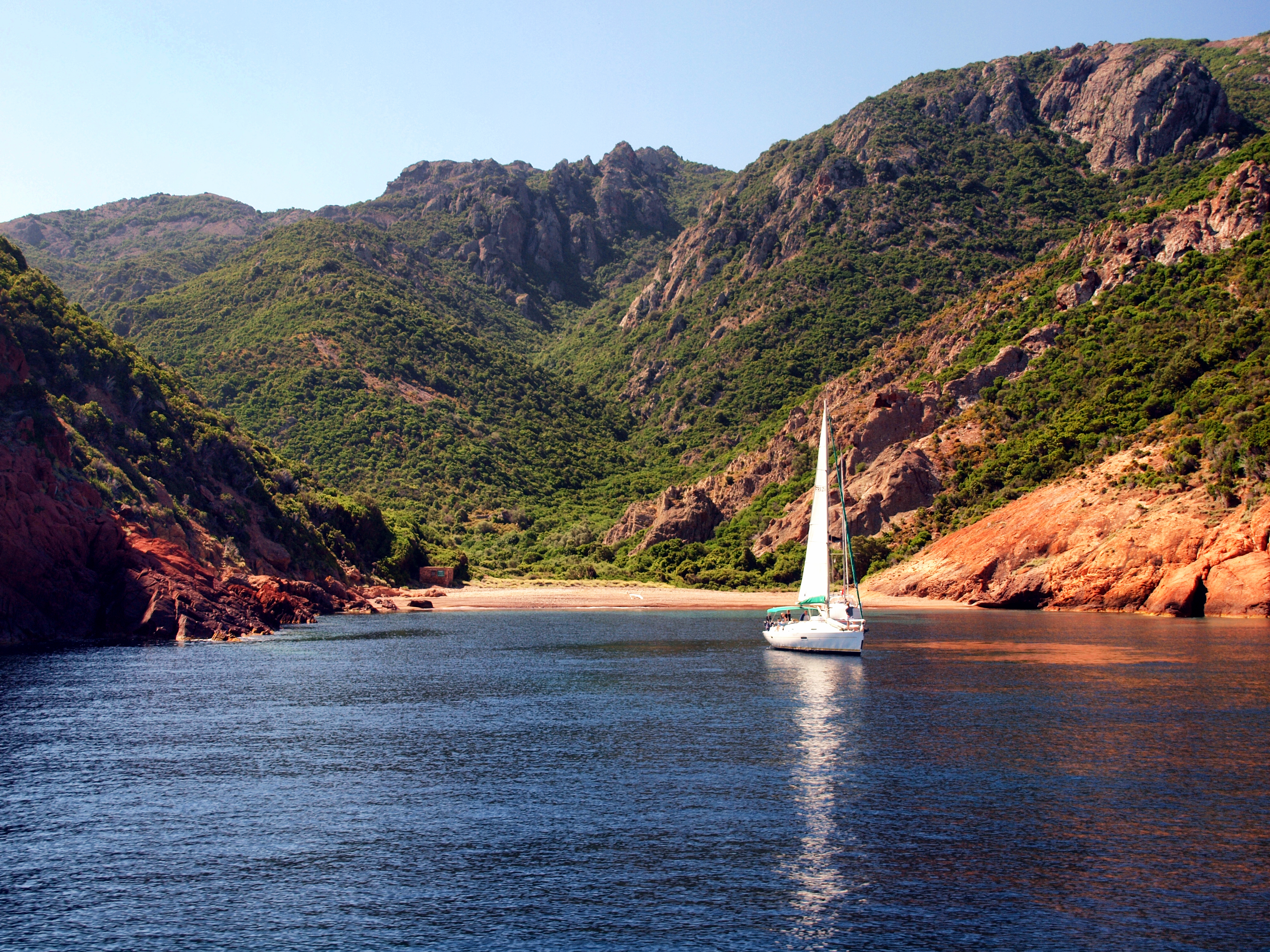 Osani, Ouest Corse (Corse) - Marine d'Elbo, au nord de la Réserve naturelle de Scandola.